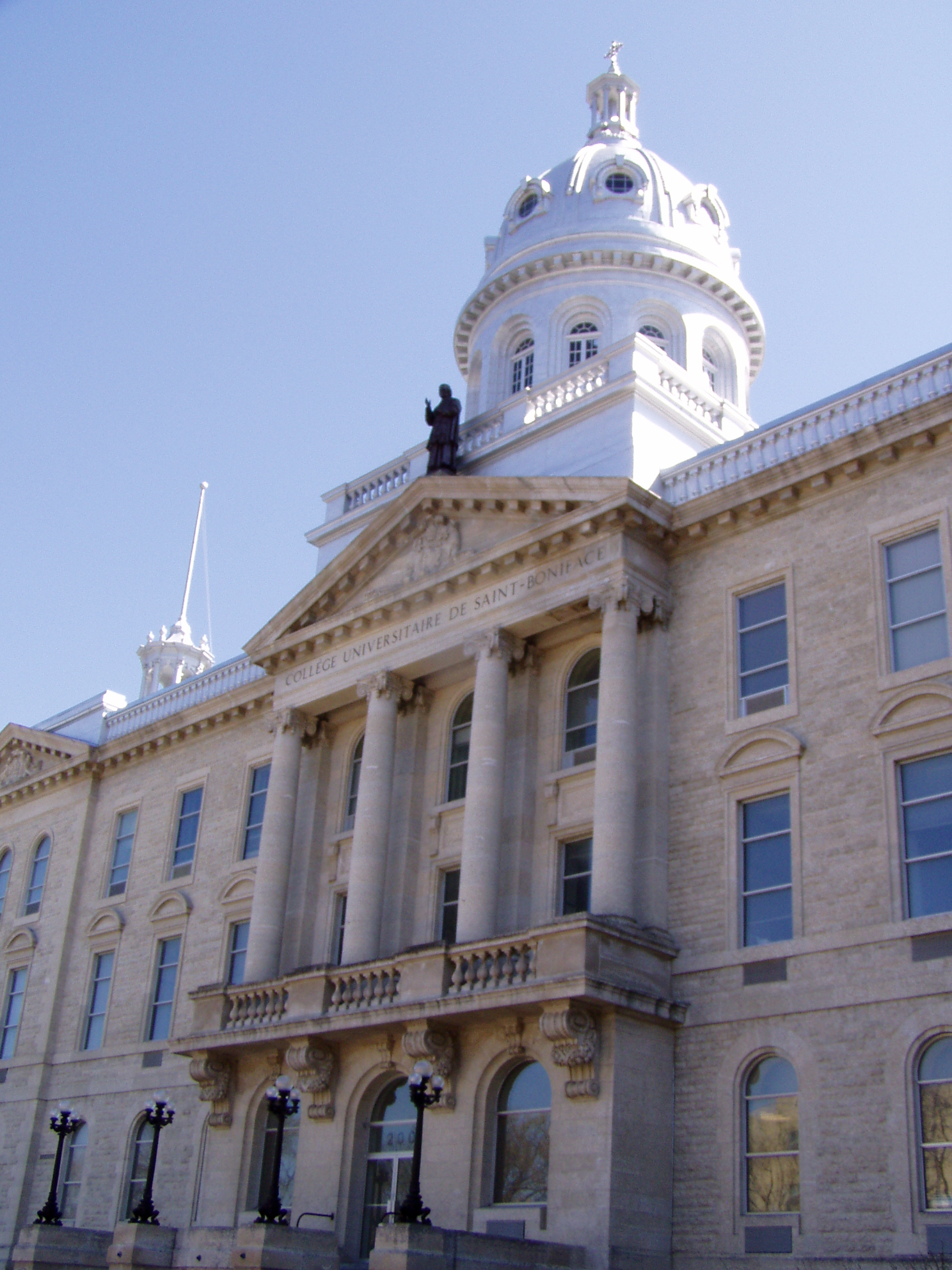 Collège universitaire de Saint-Boniface in Winnipeg, May 2, 2005